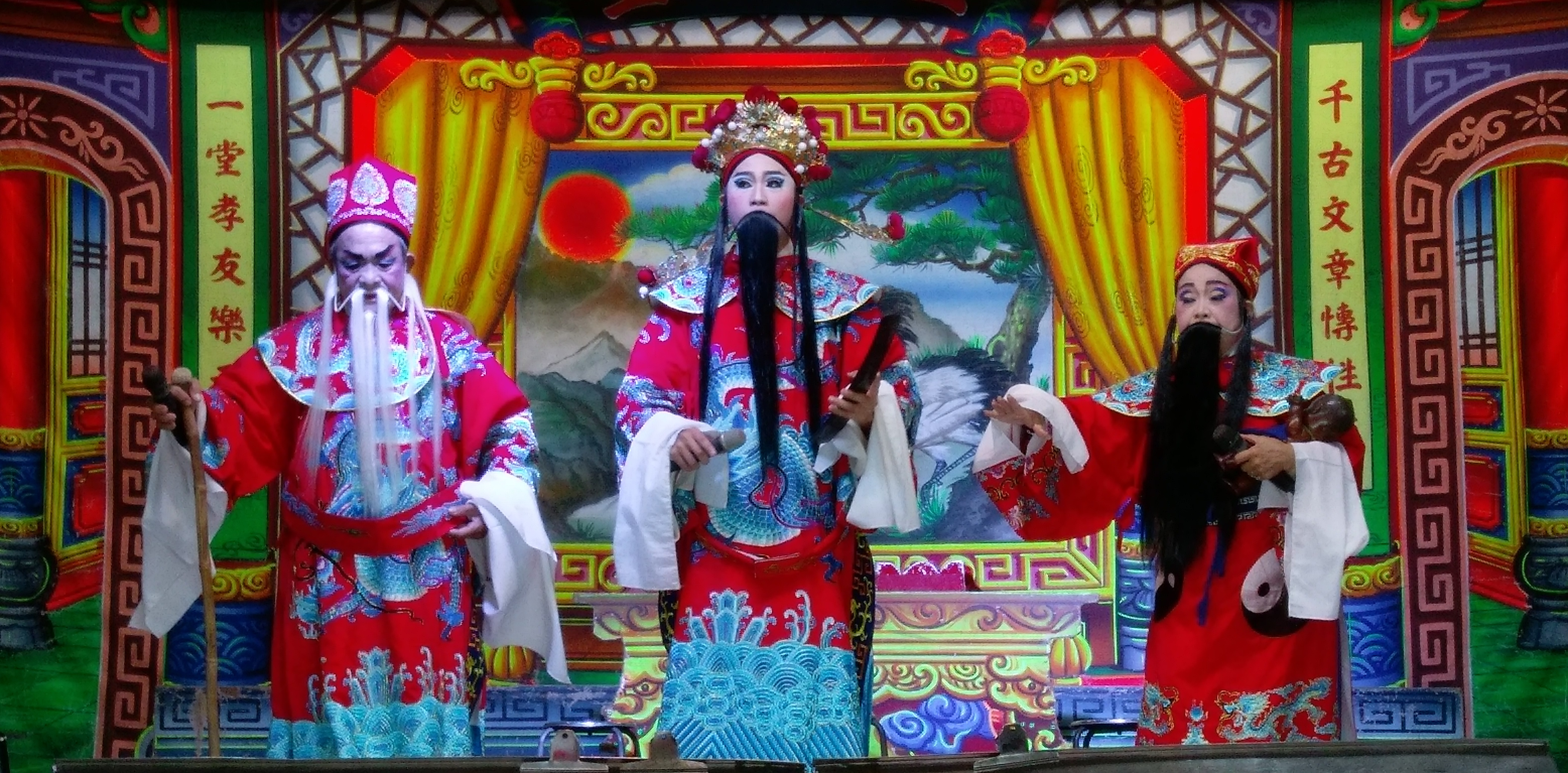 中文（台灣）: 歌仔戲扮仙-大三仙會